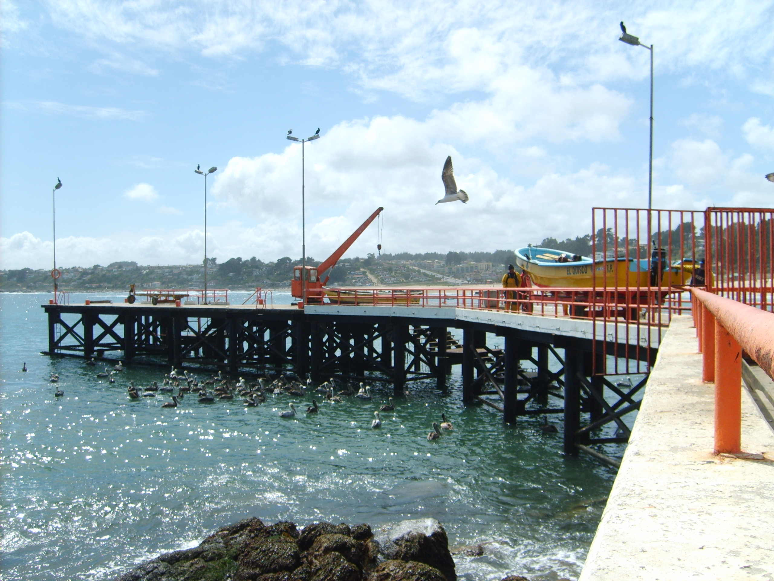 Muelle de El Quisco, inaugurado en 1997. El Quisco, Valapraíso, Chile.